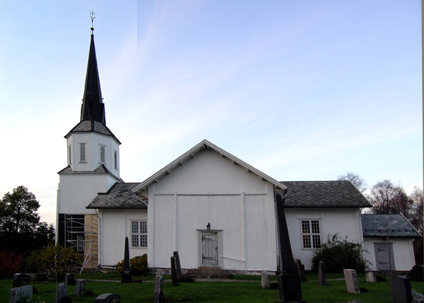 Fenstad Church, Eidsvoll, Norway.